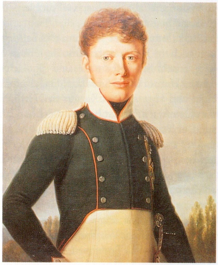 Jugendbildnis König Wilhelms von Württemberg (1781-1864)